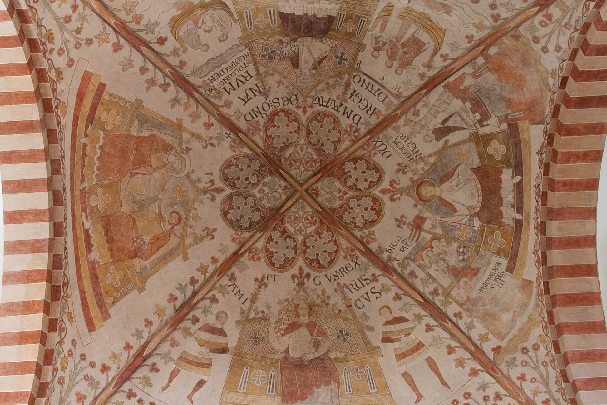 Kalkmaleriet i hvælvingen i Skt. Bendts kirke i Ringsted